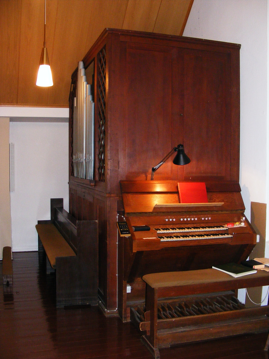 Foto des Spieltisches der Orgel der Kirche St. Josef Krauthausen